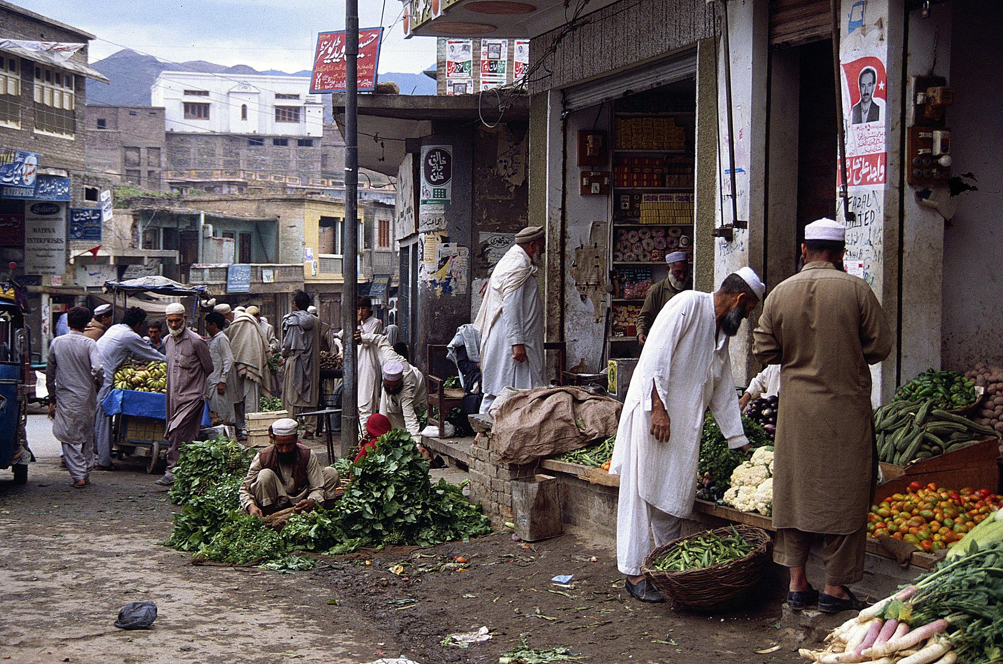 Swat: Markt in Mingora